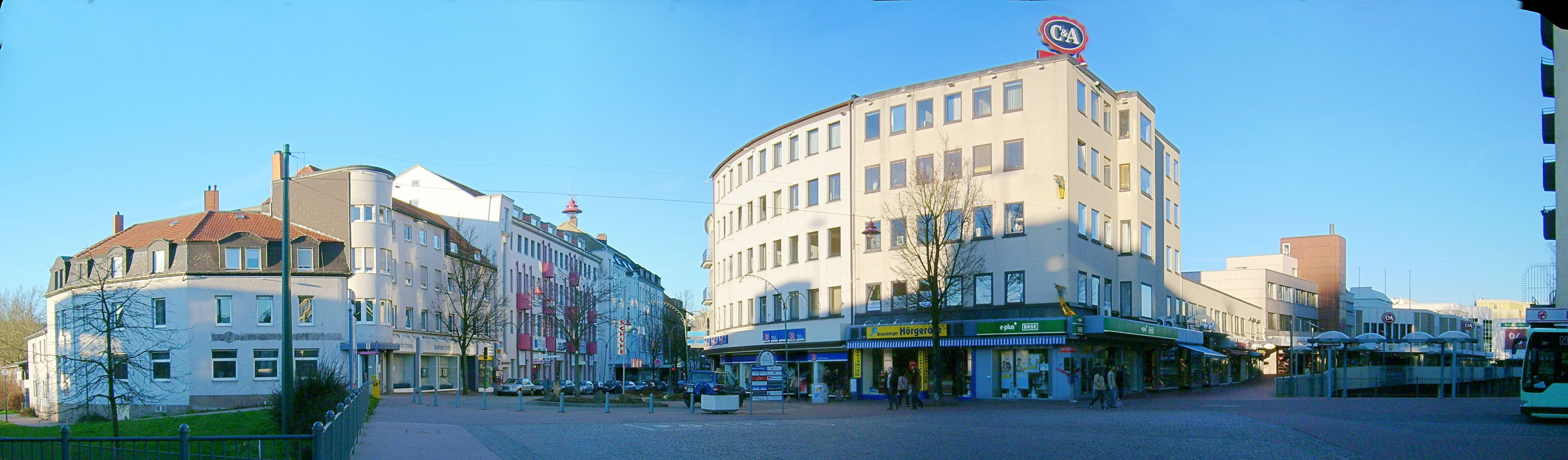 Panorama in Neunkirchen (Saar)